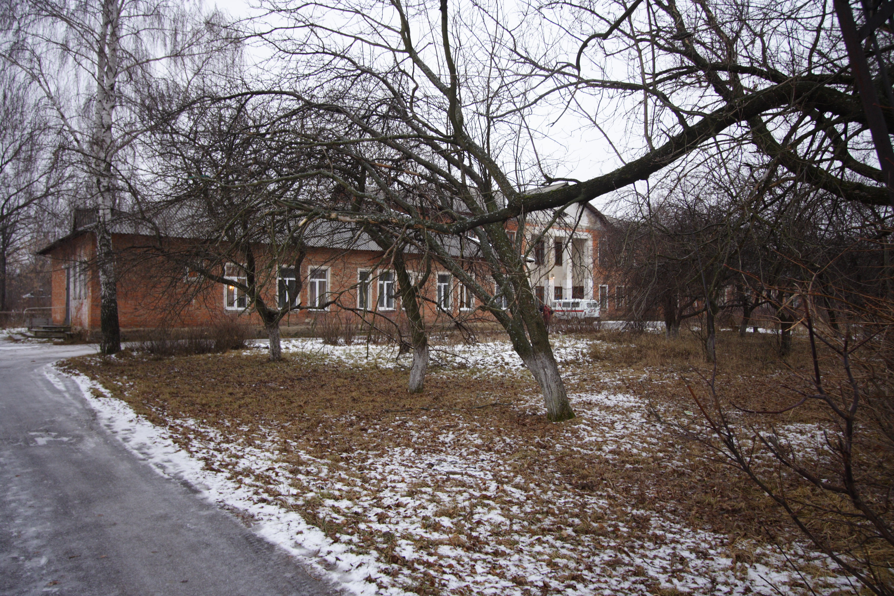 Новольвовск